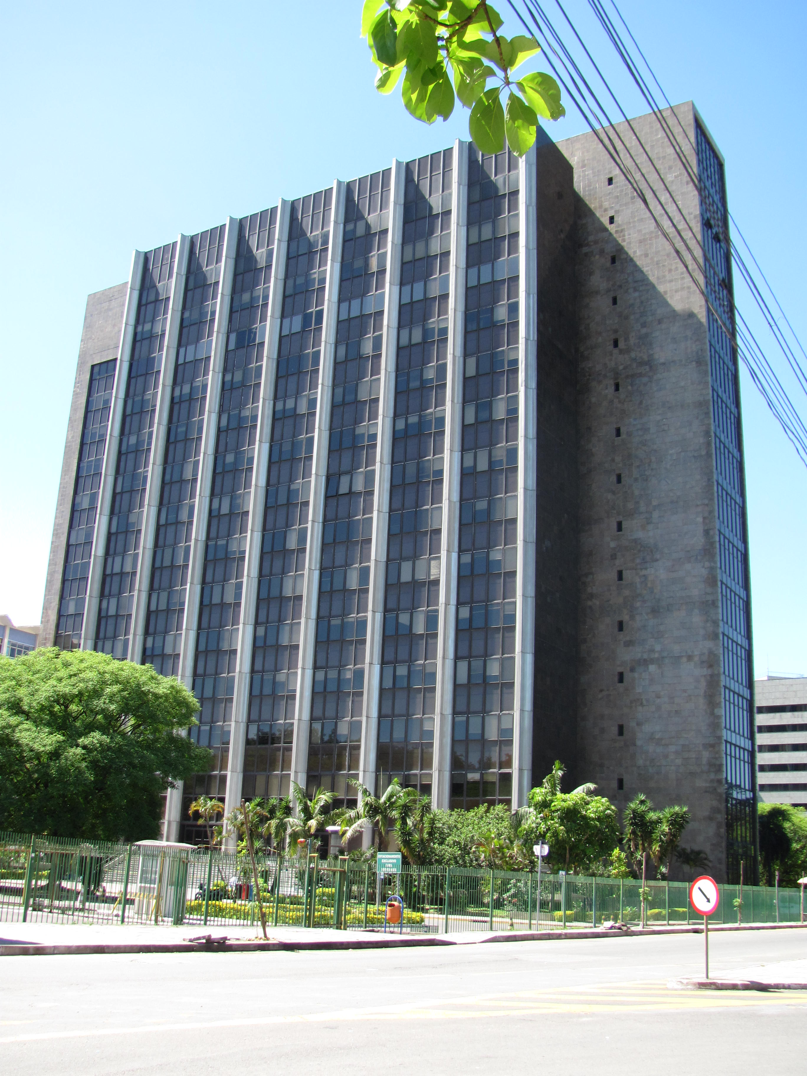 Prédio da Receita Federal, conhecido como "Chocolatão".